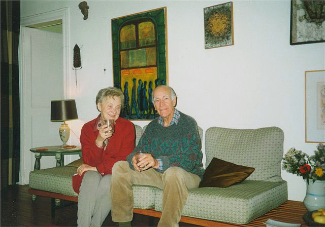 Zofia (1922-2010) and Kazimierz (1916-2010) Romanowicz